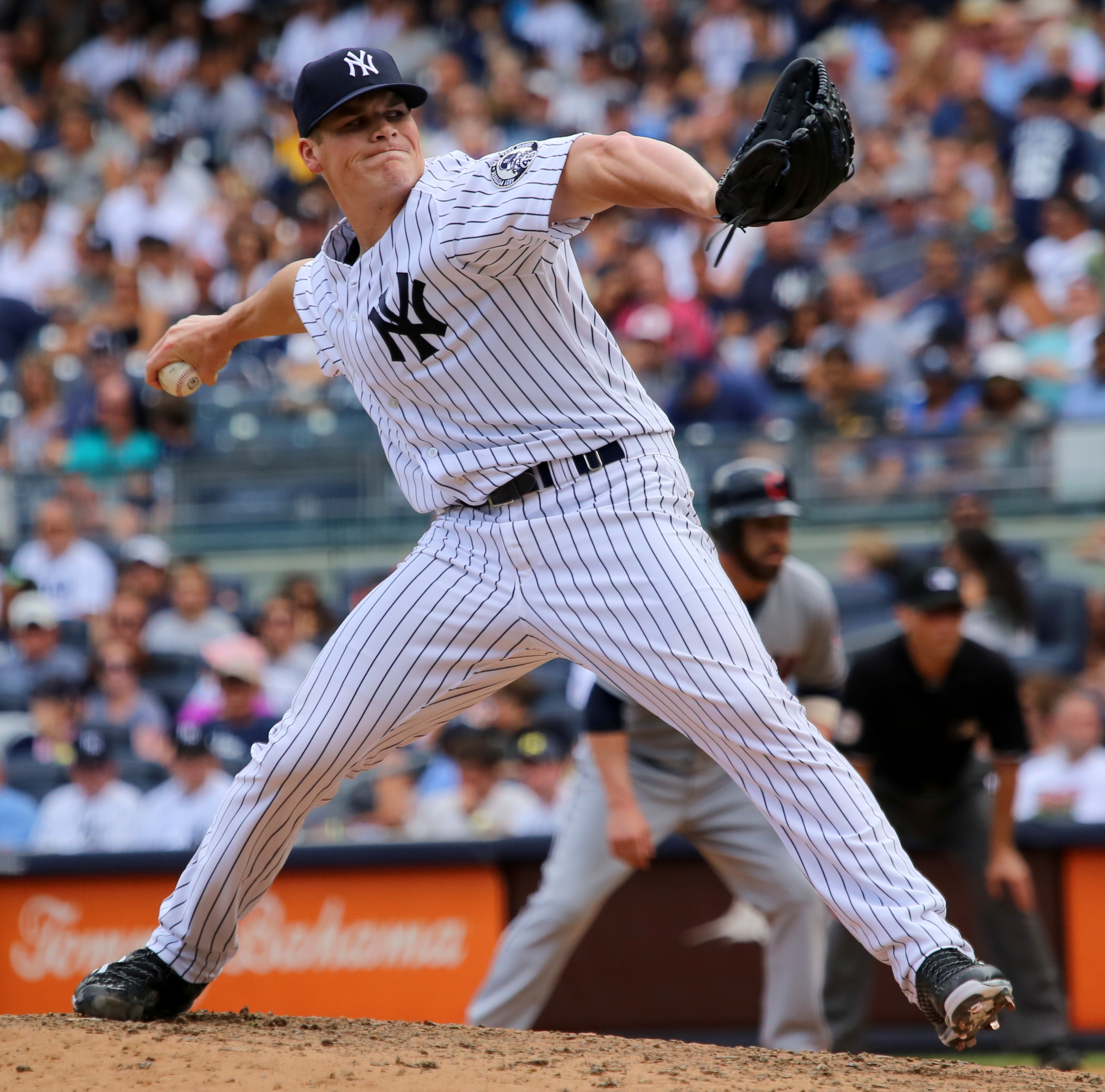 Branden Pinder